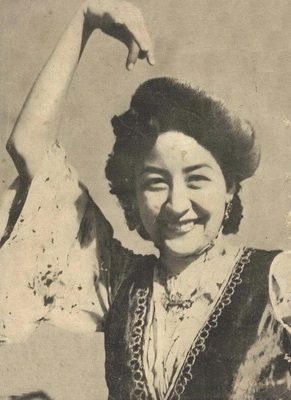 中文（中国大陆）: 新疆青年歌舞团访问团维吾尔族女舞蹈家康巴尔汗。 抗战胜利后，张治中三次进新疆，初步稳定了新疆局势，维护了国家的统一。就在这样的背景下，一九四七年九月，新疆组成青年歌舞访问团，赴南京表演，以昭示民族的团结。 新疆青年歌舞访问团近六十十人，男女团员各半。于二十五日、二十六日分两批到达南京大校场机场。团长艾莎、副团长伊兹及辅导员潘丰于三周前先期来宁布置。新疆青年歌舞访问团演员们一下飞机就受到热烈欢迎，尤其年轻美丽的女演员，虽然一路风尘，依然神韵照人。其中一个年仅十一岁的小演员特别受到瞩目，被欢迎人们和记者团团围住问长问短。 新疆青年歌舞访问团团员全部下榻介寿堂（位置在南京洪武路正洪街，即今“工人文化宫”内）二十六日晚，张治中、于右任、邵力子和白崇禧等民国要人为他们设宴洗尘。十月十一日起，新疆青年歌舞访问团在南京新街口大华戏院正式公演。让看惯香艳大腿舞，听惯郎呀妹呀的南京人耳目一新，演员们高超的舞技、歌喉，引起南京人的轰动。当时各报均以大量篇幅报道了这次演出时的盛况。戴爱莲、梅兰芳以及许多文艺界知名人士观看了该团的演出，并给予极高评价。其间，蒋介石观看了演出，宋美龄也专门接见了歌舞团的演员，并合影留念。 演出节目里最具代表性的舞蹈如单人舞《莫斯克拉特》、《乌夏克》、《木乃加提》、《加扎依尔》、《乌斯满尼亚》；双人舞《凝视你的黑眉毛》、《塞依利玛》；群舞《萨巴》、《爱人美如花》、《在树上看见你》、《申姆夏姆》；独唱、合唱《恋歌》、《我的同伴》、《我们去吧》、《美丽的姑娘》等二十一个歌舞节目。他们用歌舞歌颂爱情、赞美历史、表现生活，一扫当时多愁多病、扭捏作态的靡靡之风，且水平之高，感染力之强，引起南京观众的普遍赞誉，南京各报均以大量篇幅报道了这次演出时的盛况。 演员中维吾尔族女舞蹈家康巴尔汗以妩媚庄重、潇洒俊逸、轻盈流畅的舞姿，倾倒了无数观众，被南京观众誉为“维族之花”、“新疆的梅兰芳”。康巴尔汗当年二十六岁，其丈夫拉亦姆亦随之前来。据说康巴尔汗曾被人抢掠，年青英勇的拉亦姆手握双枪，跃马飞驰数十里救下康巴尔汗，成就了他们这段姻缘。不久，新疆青年歌舞访问团去上海、台湾演出，便离开了南京。（见